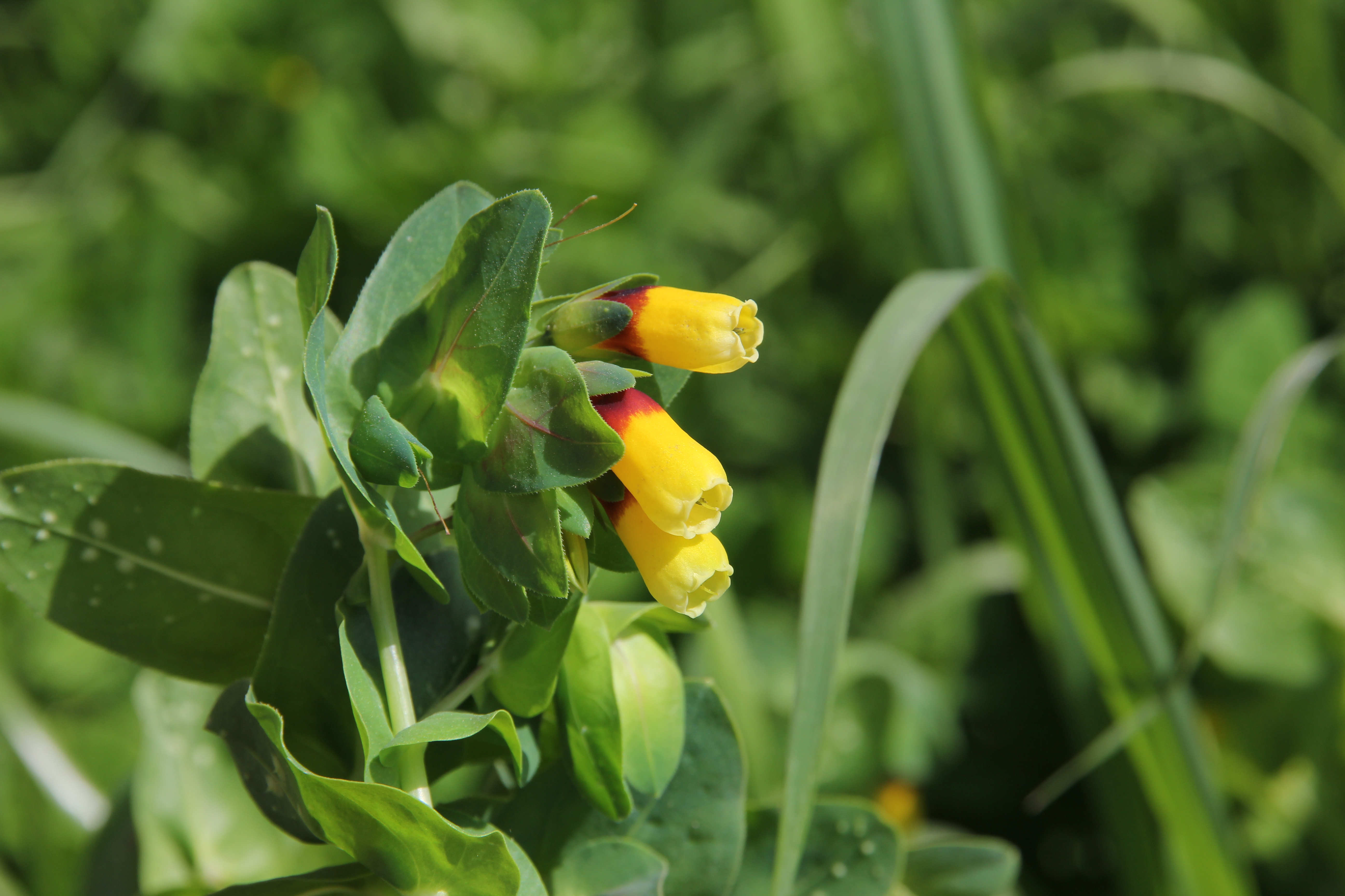 Flora della Sardegna